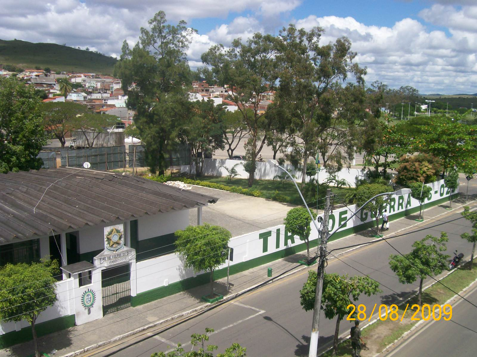 nova Frente do TG 06 - 023-Itapetinga/BA, 28 Ago 2009